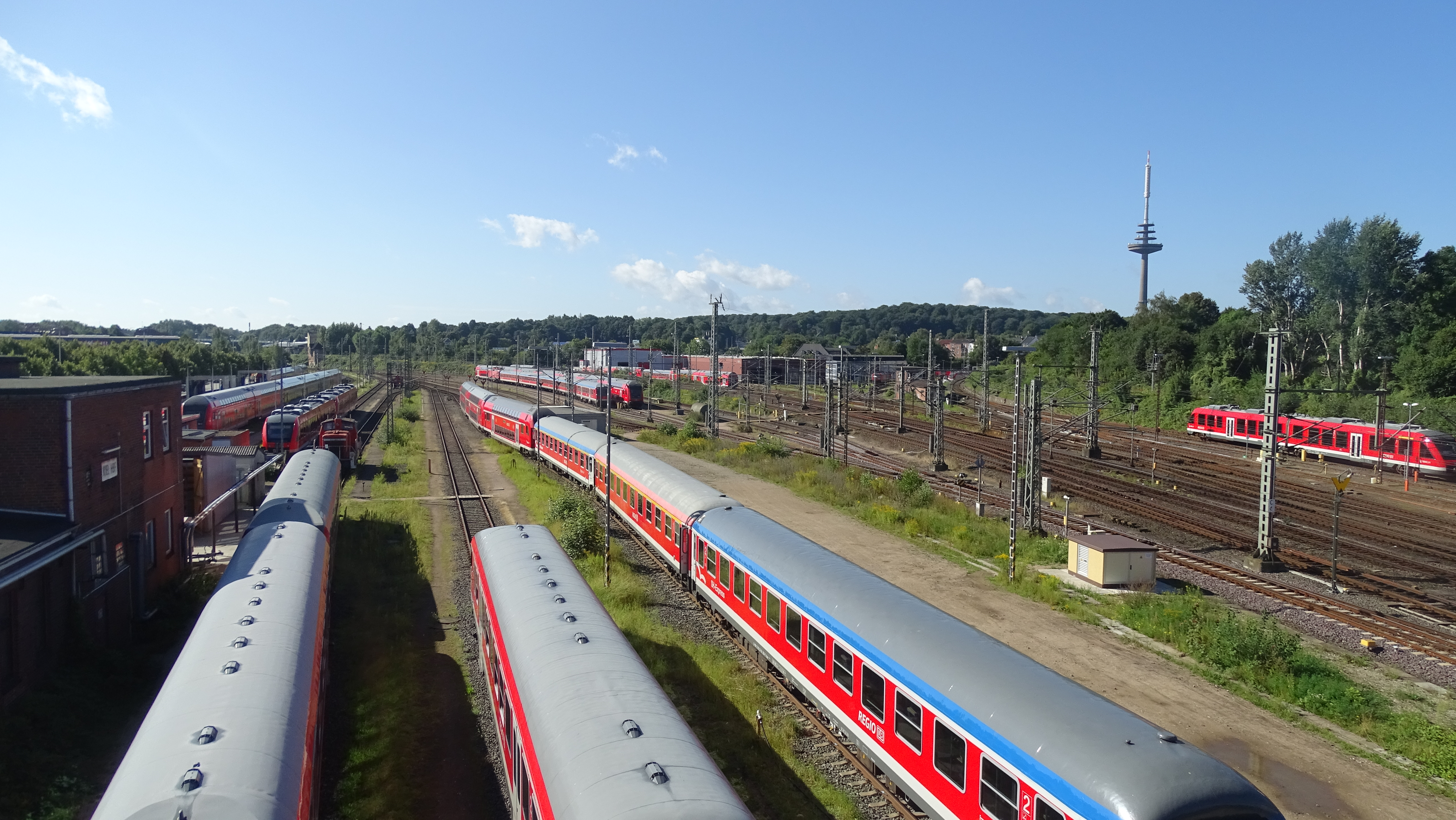 Blick auf das Bahnbetriebswerk Kiel von der Gablenzbruecke. Im Bahnbetriebswerk Kiel werden saemtliche Fahrzeuge der Regionalbahn SH gewartet.